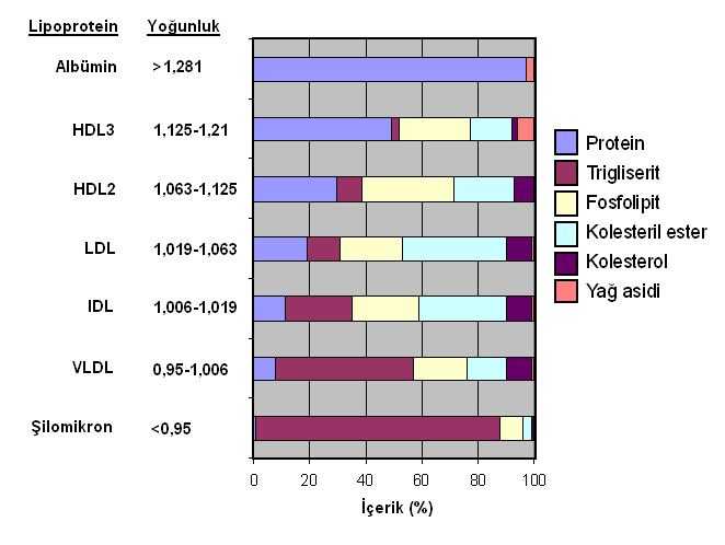 Plazma lipoproteinlerinin yoğunlukları ve içerikleri. Bu kaynaktaki bilgilerden grafiklenmiştir.